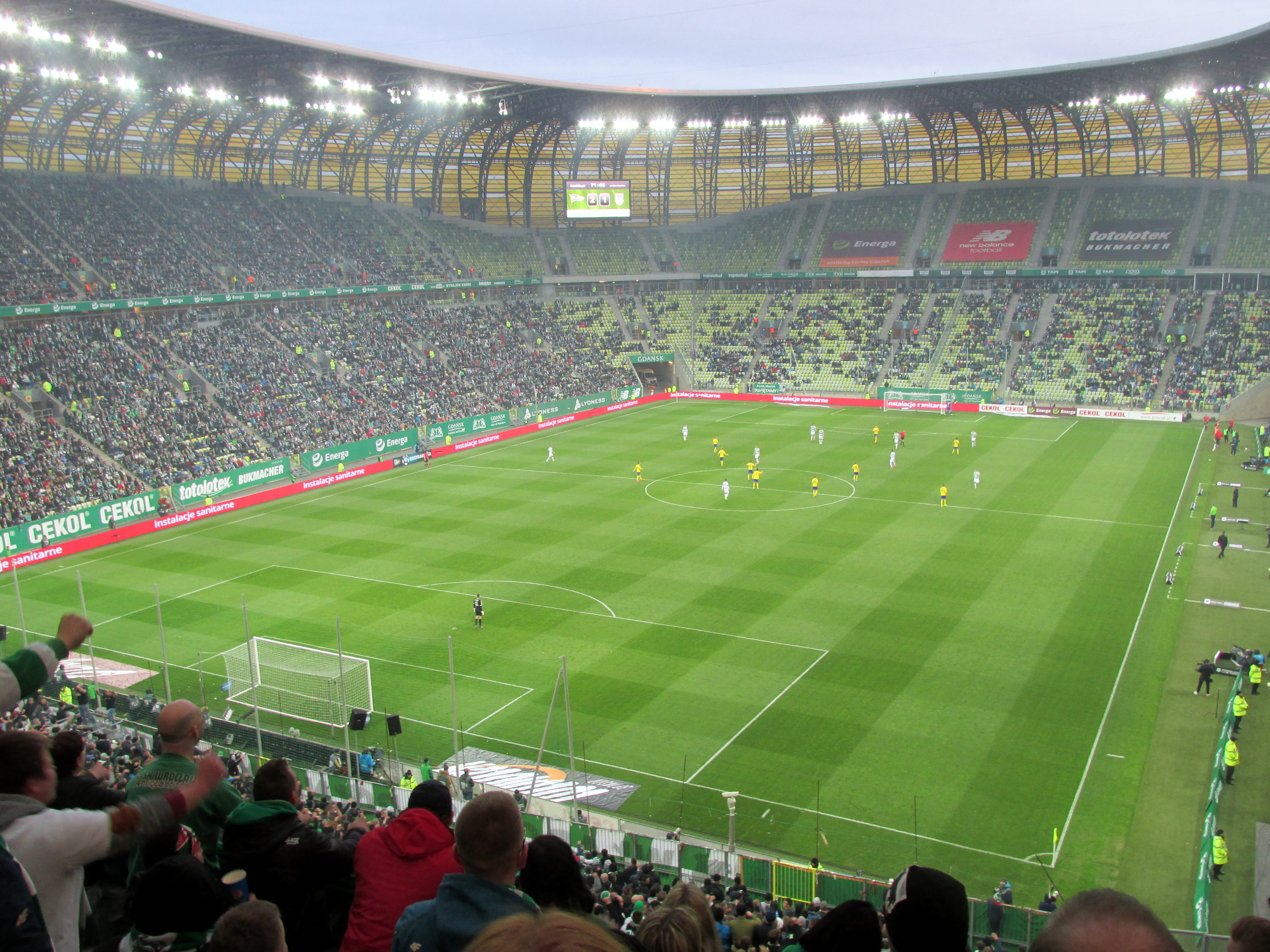 37. Derby Trójmiasta w piłce nożnej. Lecha Gdańsk - Arka Gdynia (2:1), 17 kwietnia 2017, Stadion Energa Gdańsk